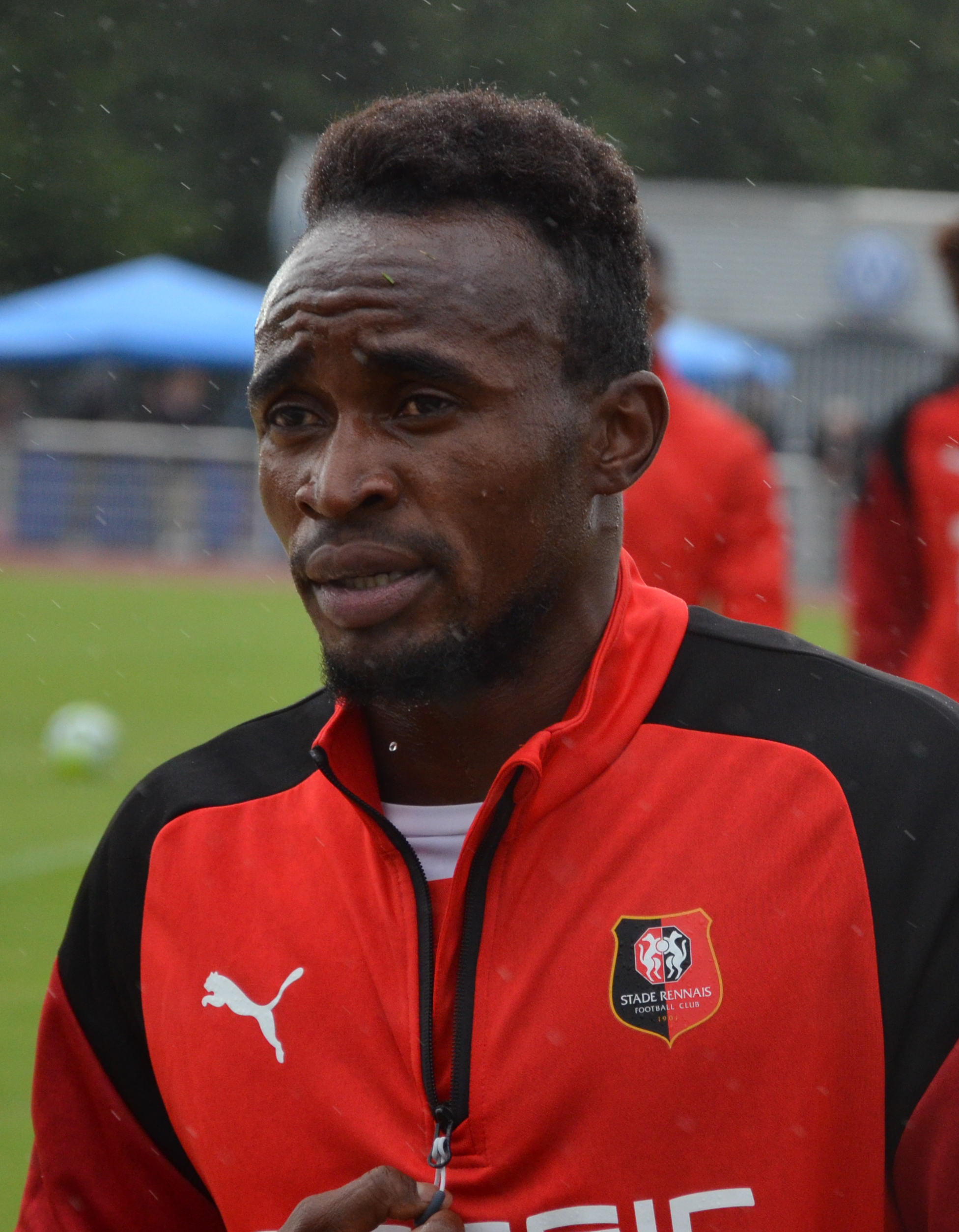 Photographie prise lors du match opposant le Stade rennais au SM Caen en match amical au stade Pierre-Compte de Vire le 22 juillet 2017. Ici, Firmin Mubele.